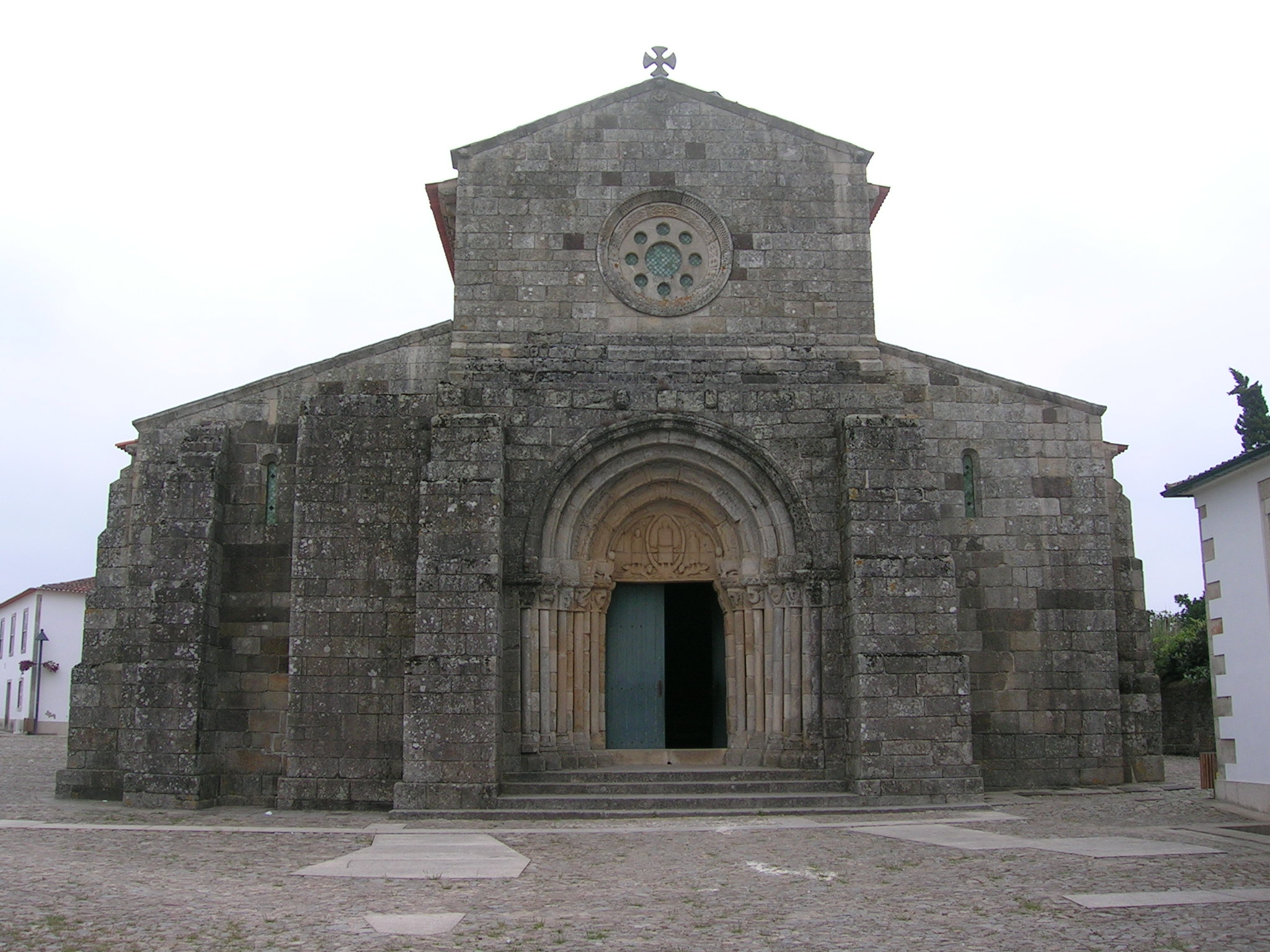 Igreja de São Pedro de Rates, Póvoa de Varzim, Portugal. Foto tirada por Maria João Queirós.